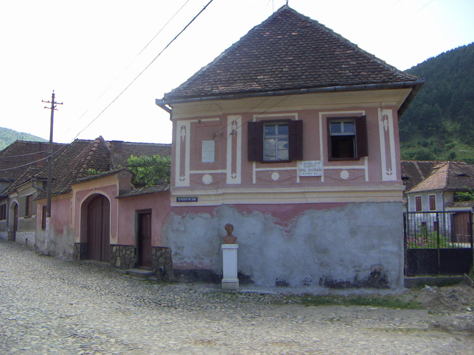 Casa din Răşinari, Sibiu unde s-a născut Emil Cioran The house of Răşinari where Emil Cioran was born La casa de Răşinari, en donde nació Emil Cioran